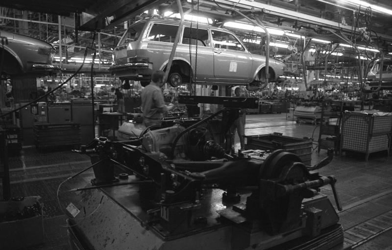 VW-Werk, Wolfsburg Montage 412